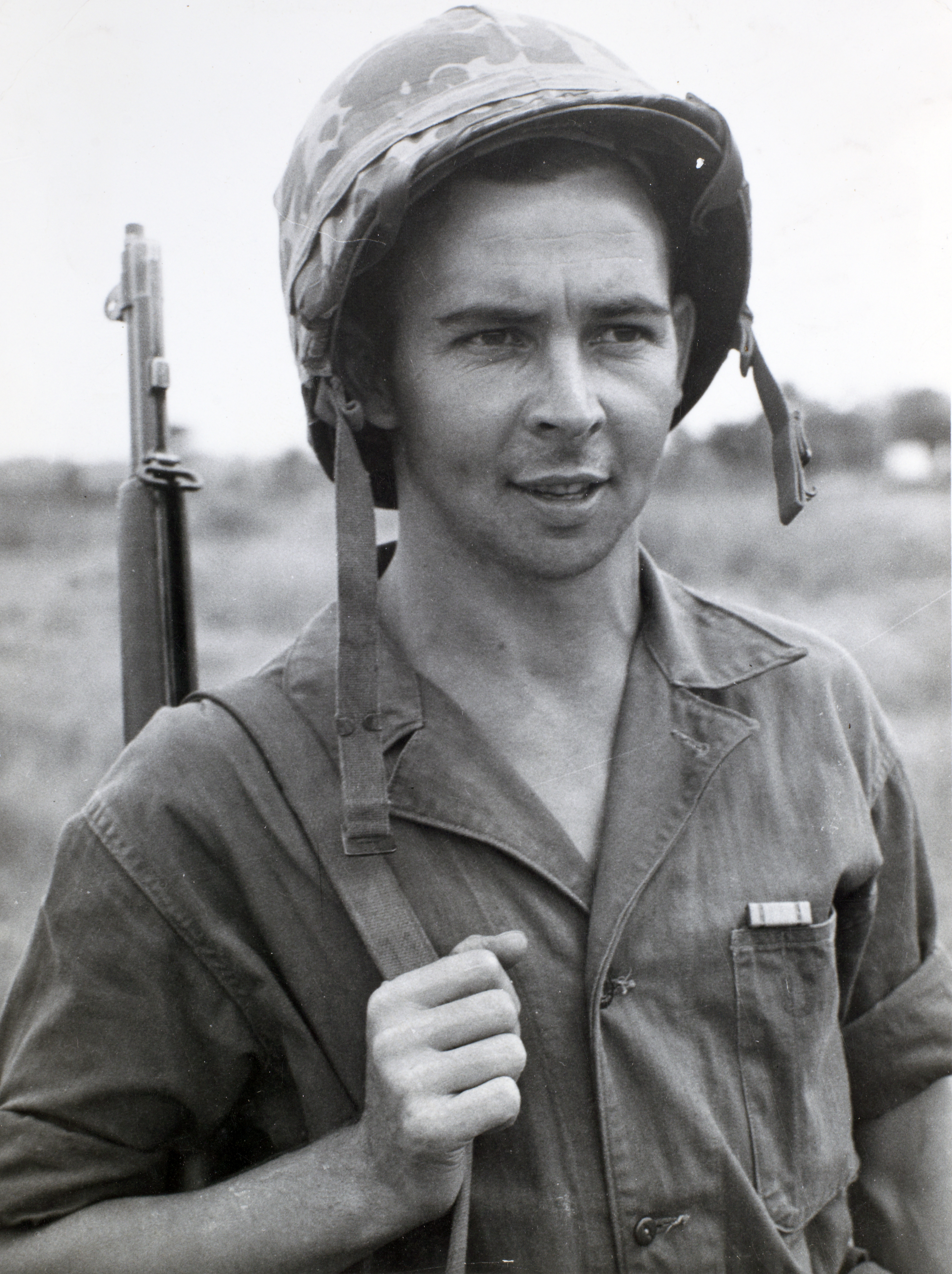 Portretfoto van korporaal der mariniers Albert Hoeben (RMWO4).